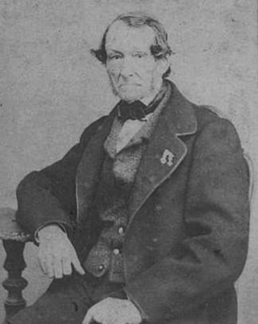 Docteur Henri Eloi Leroy